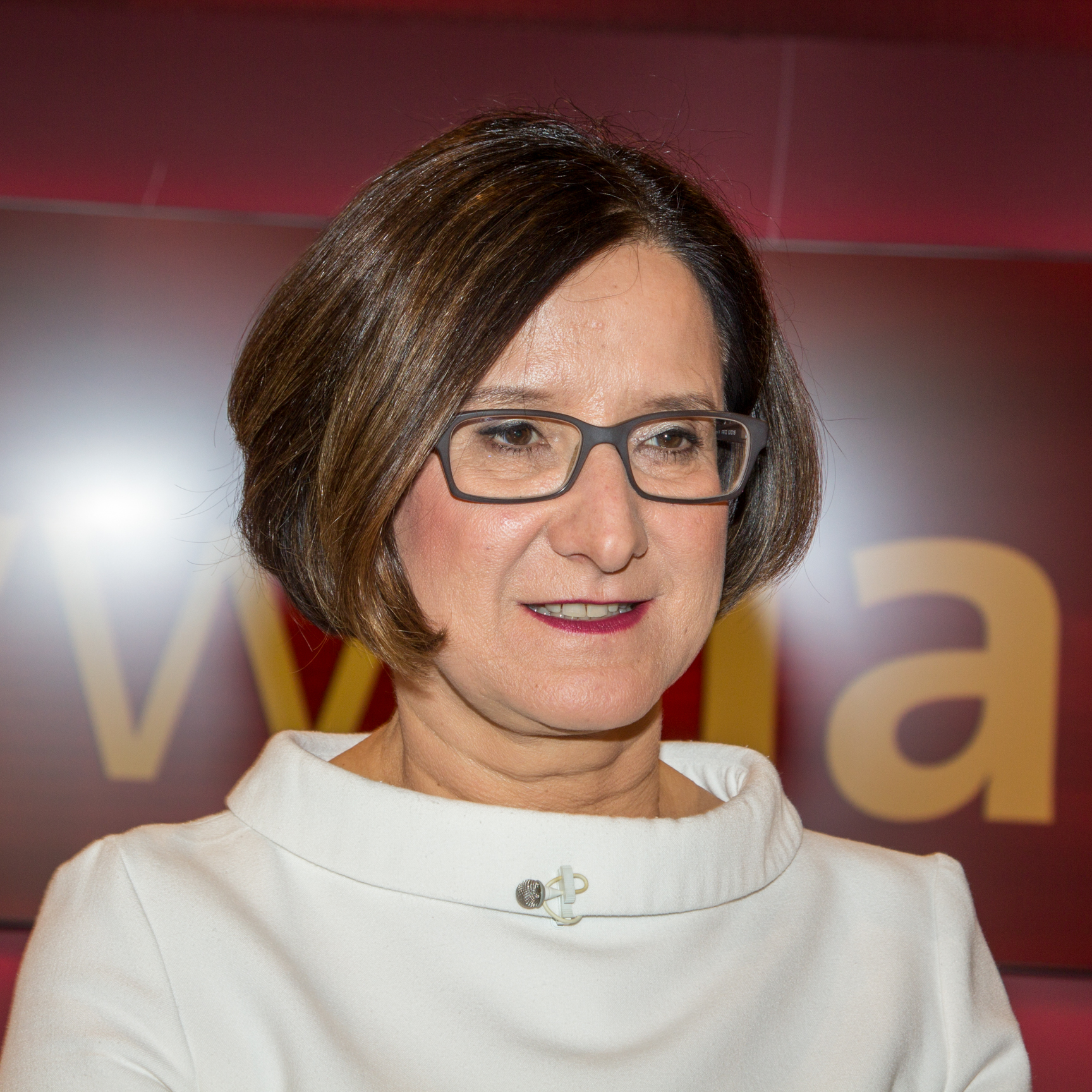 Johanna Mikl-Leitner in der WDR-Sendung "hart aber fair" am 15.2.2016